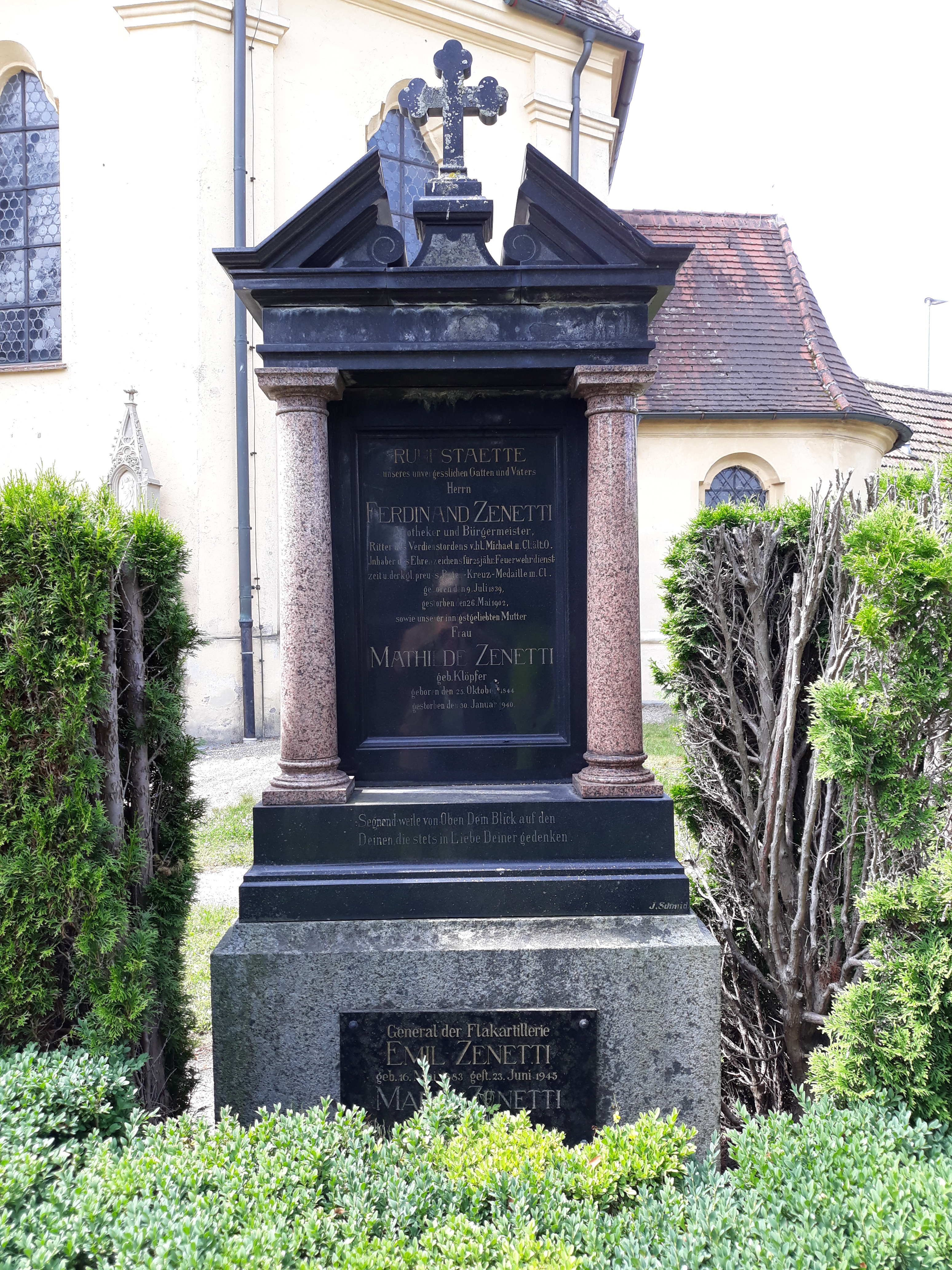 Das Grab des Apothekers und Lauinger Bürgermeisters Ferdinand Zenetti auf dem Alten Friedhof Lauingen.